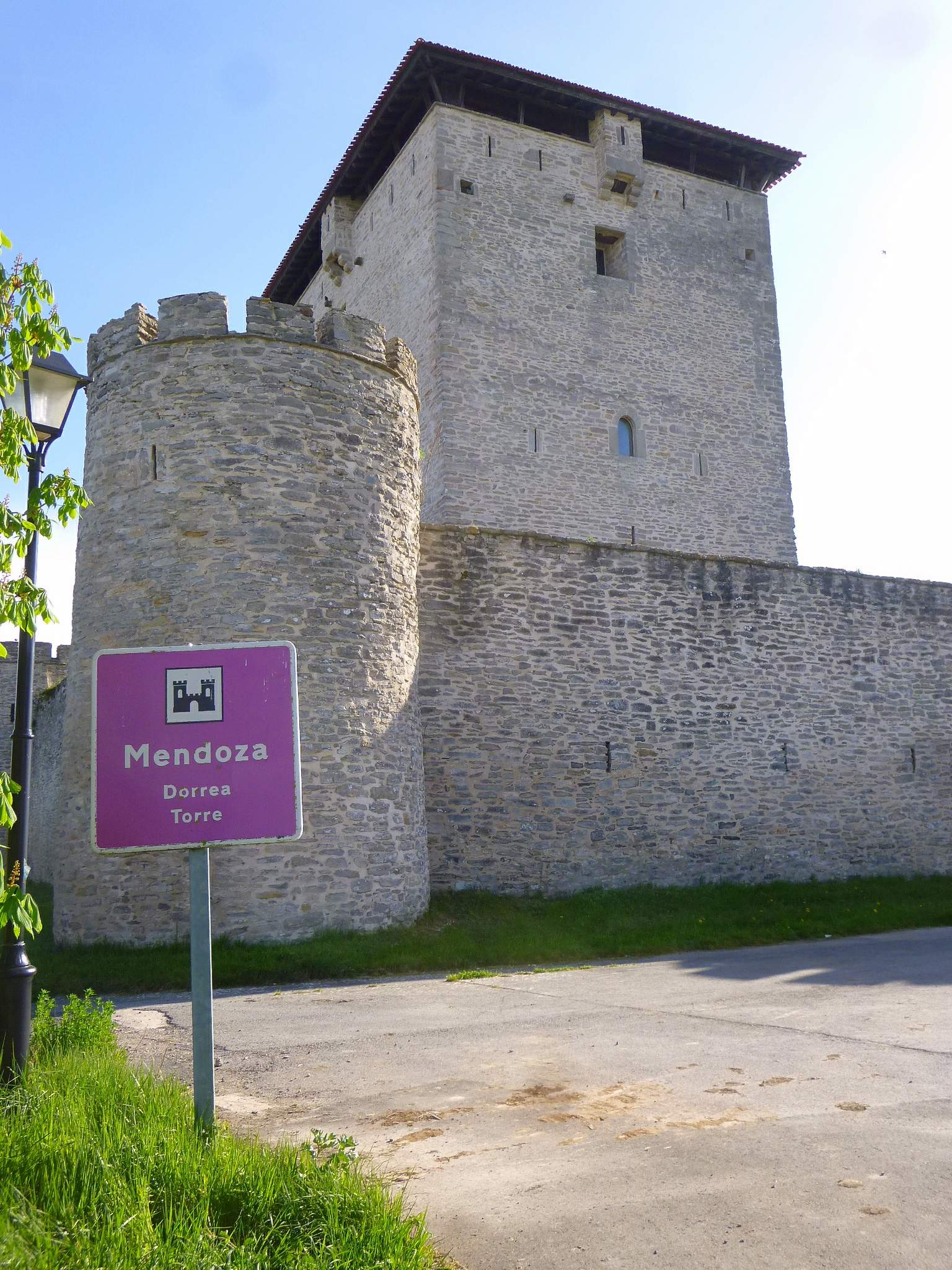 Mendoza (Vitoria, Álava) - Torre de Mendoza